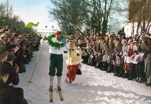 Mora-Nisse